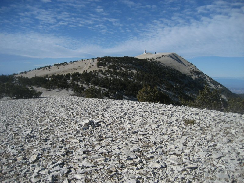 Sommet du Mont Ventoux, Vaucluse, France.